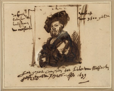 Dibujo a partir del retrato de Baltasar de Castiglione por Rafael. Pluma sepia sobre papel, Viena, Albertina. Inscripción manuscrita: "l.o. "de Conte / batasar de / Kastijlyone / van raefael"; r.o. "verkoft / voor 3500 gulden"; M.u. "het geheel caergesoen tot Luke van Nuffeelen / heeft gegolden fl 59456: - :Ano 1639"